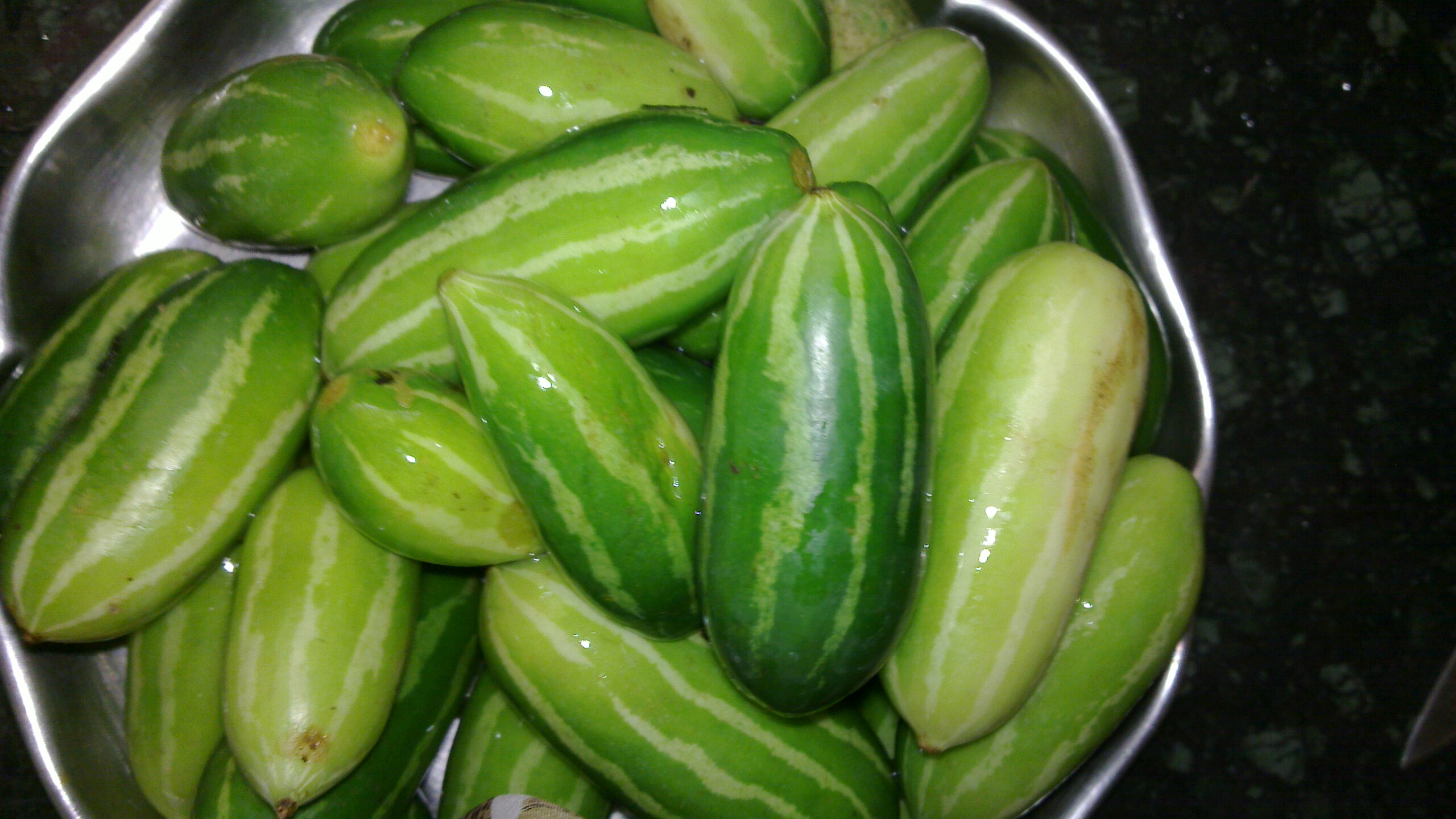 கோவைக்காய்